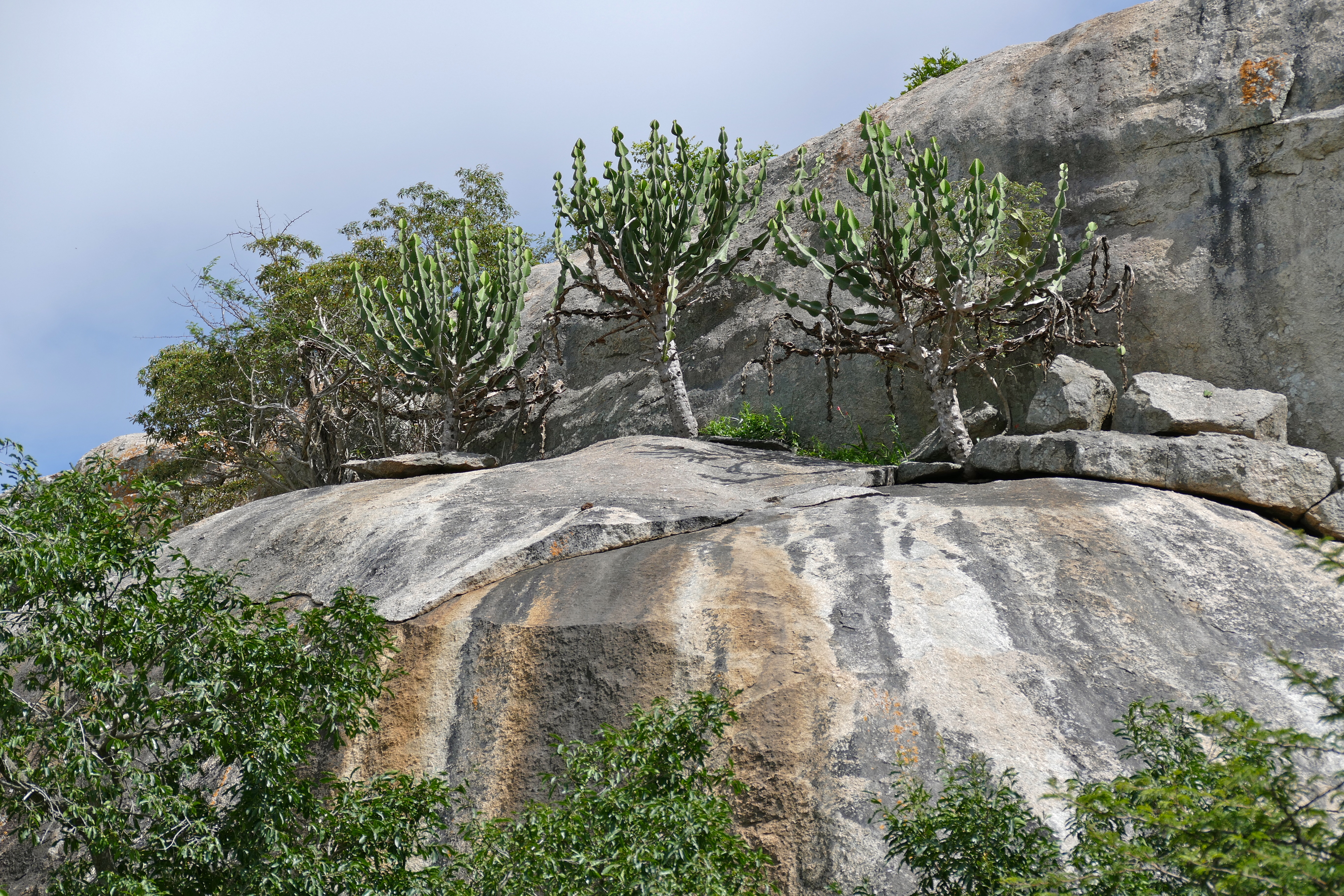 Renosterkoppies, S112 Road North of Afsaal, Kruger NP, SOUTH AFRICA